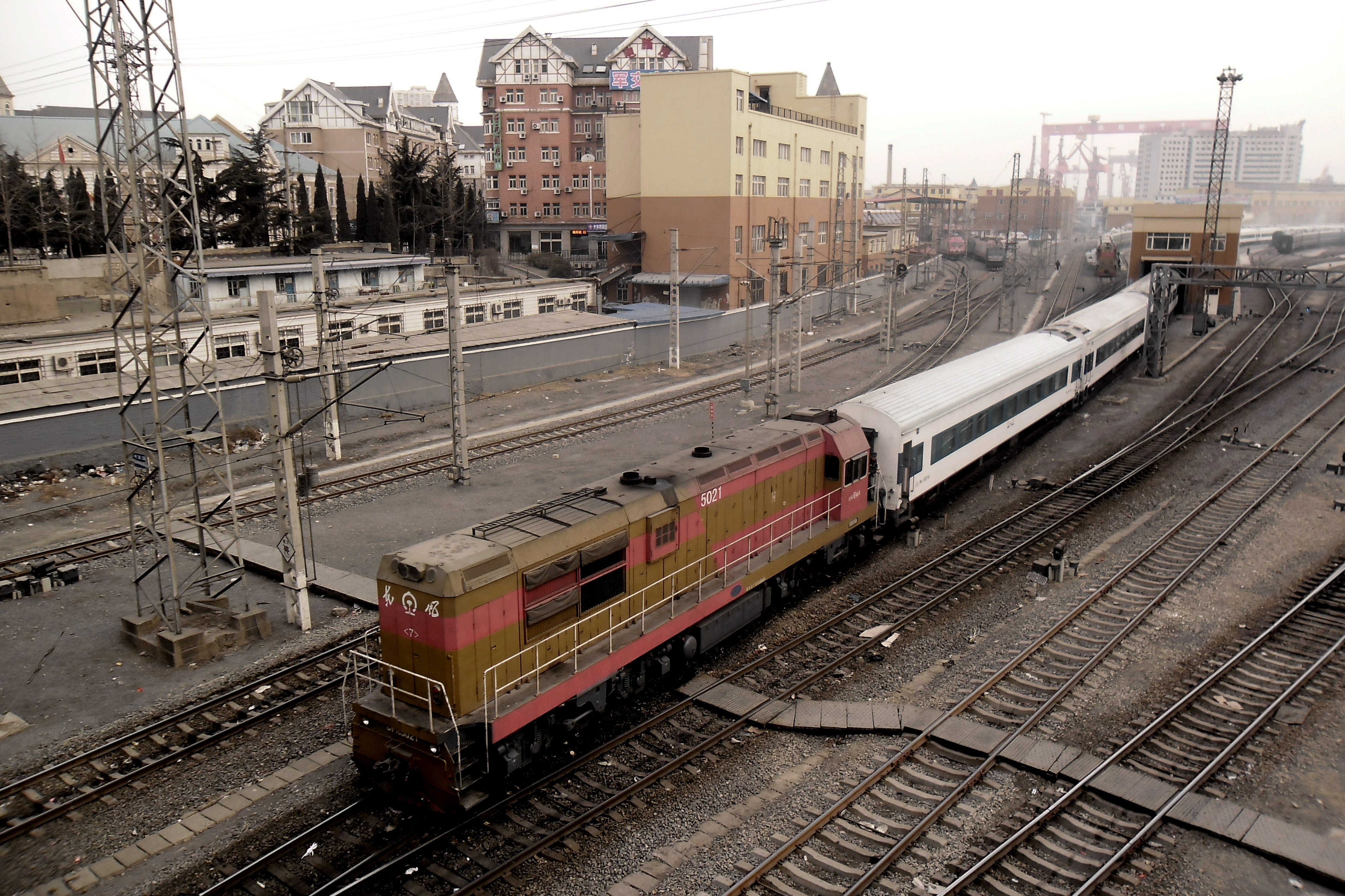 中文（中国大陆）: 辽宁省大连市